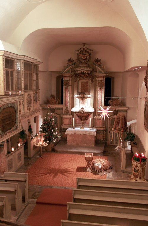 Sankt-Michaelis-Kirche Raßnitz Ortsteil Weßmar, Blick auf Kanzelaltar von 1754, Patronatsloge und Taufe mit Lesepult zur Weihnachtszeit